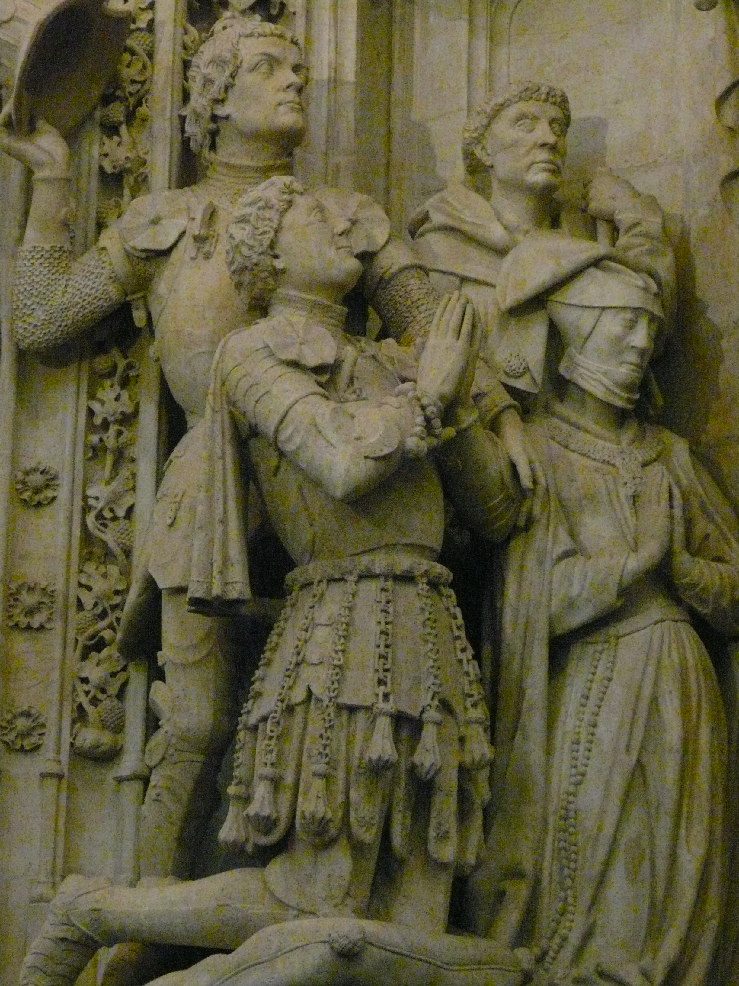 Praalgraf van Engelbrecht I van Nassau in de Grote Kerk in Breda Centrum